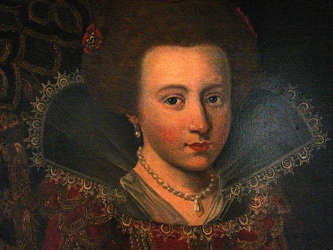 Anna Katharine, Kirsten Munk- og Christian IVs datter, fra familiebillede som barn med søskende og mor, Frederiksborg Slot, Hillerød